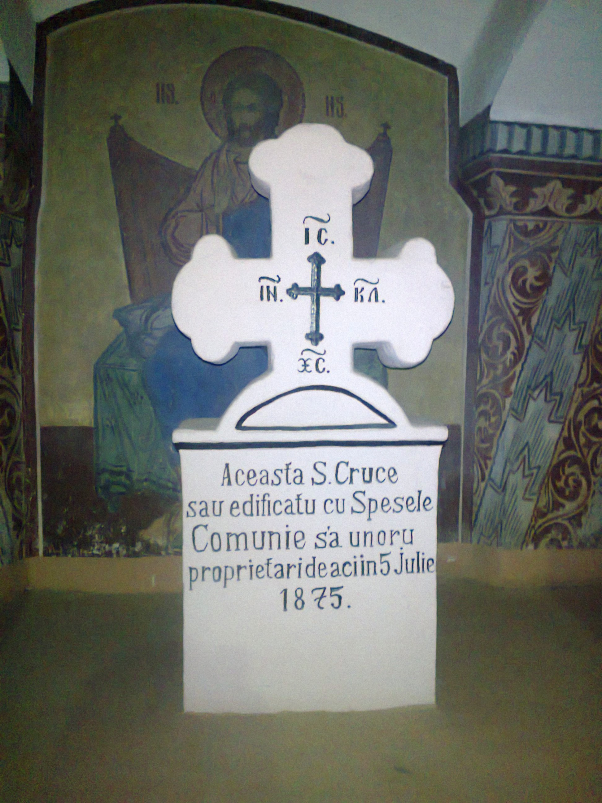 Troiţa (crucea) dinspre Avrig - detaliu, din Racoviţa, Sibiu. Ultima renovare a fost făcută în 1970 cu ocazia pictării bisericii în interior de către pictorul bucureştean Dumitru Bănică.